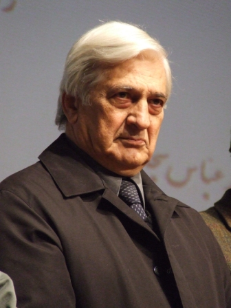 Hoshang Zarif-navazandeye Tar-هوشنگ ظریف